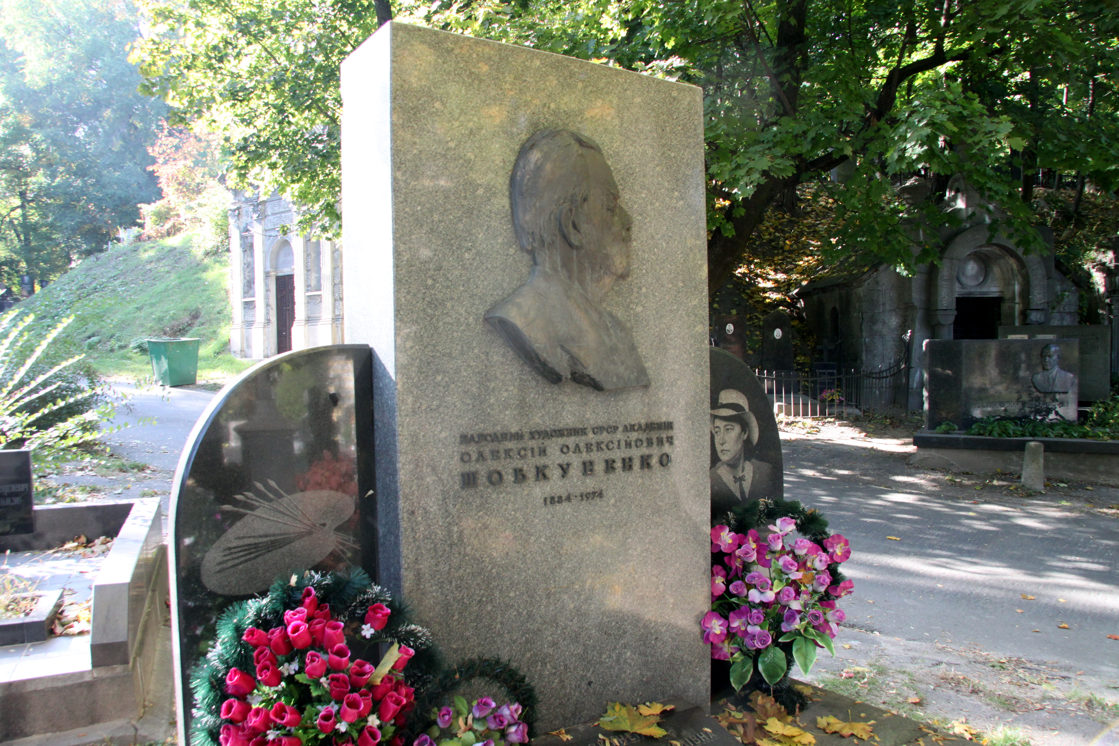 Могила Шовкуненка О. О., народного художника УРСР, Байкова вул., 6, Київ